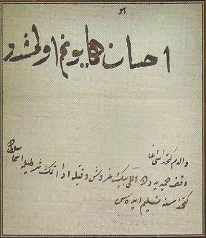 III. Selim ve IV. Mustafa'nın elyazılarının bulunduğu belge. Alt sıradaki III. Selim'in yazdığı cümlede Hamidiye Vakfı'na geri ödenmesi şartıyla 50.000 kuruş verilmesi emrediliyor. III. Selim bu emir gerçekleşmeden tahttan indirilmiş, yerine IV. Mustafa gelmiştir. IV. Mustafa da III. Selim'in elyazısının üzerine kendi elyazısıyla emri onayladığını belirten bir cümle yazmıştır. III. Selim: Validem Kethüdası Ağa, Vakf-ı Hamidiye'den elli bin guruş vaktiyle edâ etmek şartıyla Esma Sultan Kethüdasına teslim edesin. IV. Mustafa: İhsan-ı Hümâyûnum olmuştur.